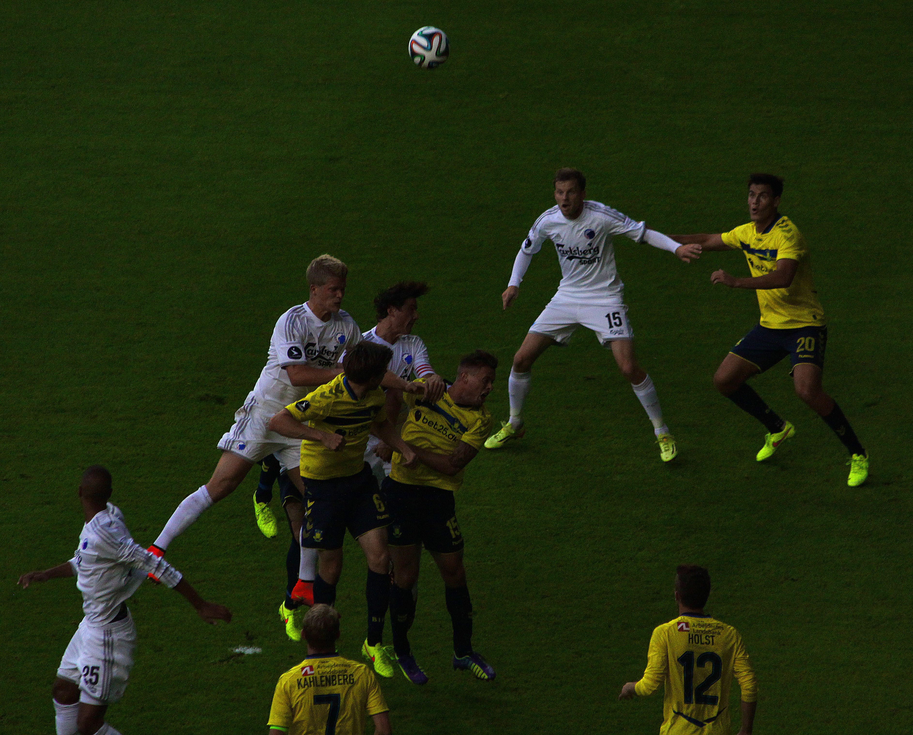 København / Copenhagen. FCK - Brøndby i Parken.